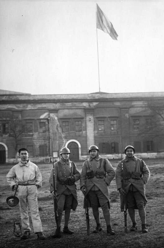 Zur Räumung Koblenz durch die Franzosen! Die französische Fahnenwache auf der deutschen Festung Ehrenbreitstein b/Koblenz a/Rh. Auf der Festung selbst die französische Tricolore, welche am 30. November endgültig heruntergeholt wird.